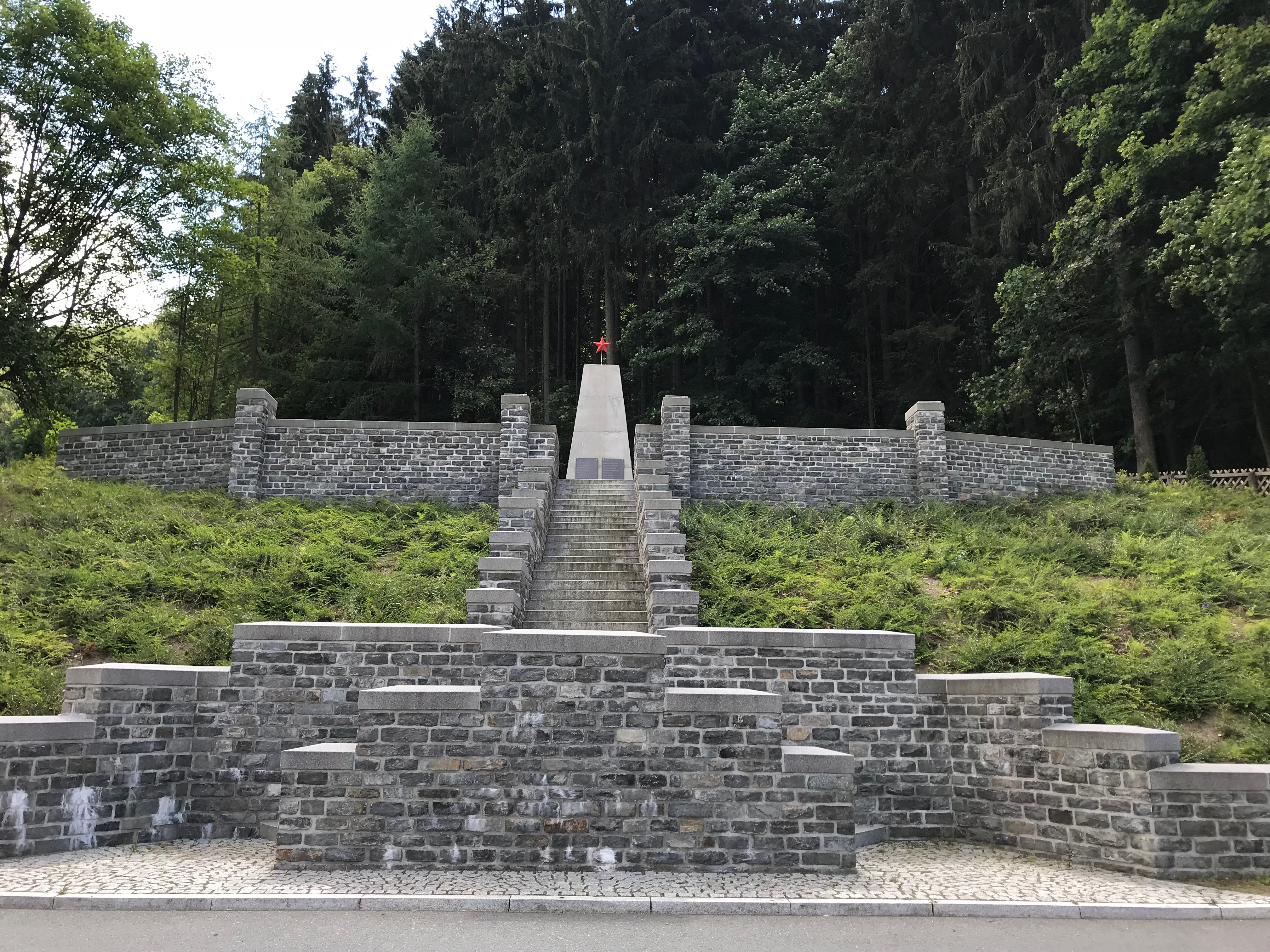 Denkmal mit Obelisk in Nenningmühle